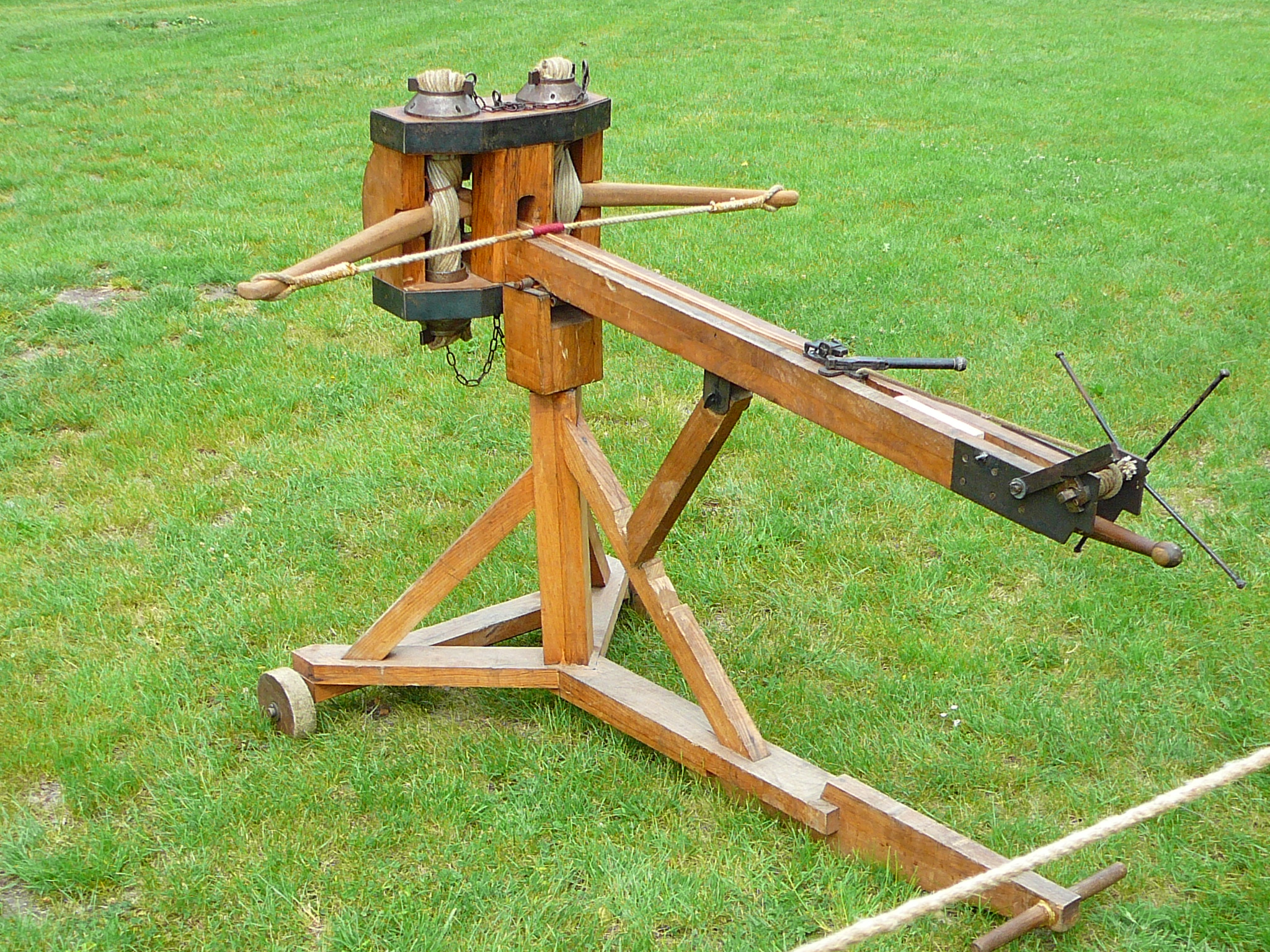 Römische Feldkatapult